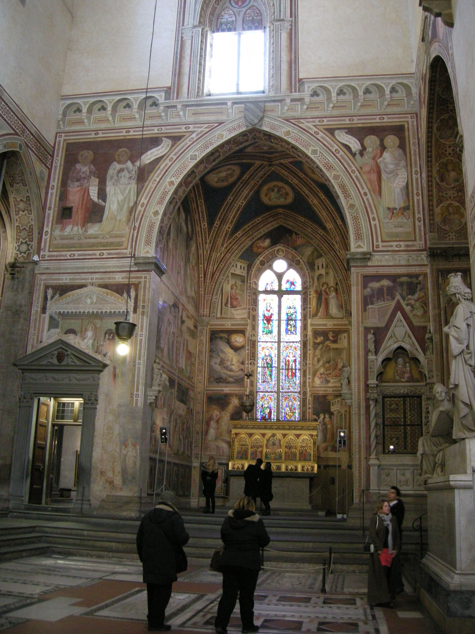 Cappella baroncelli 001